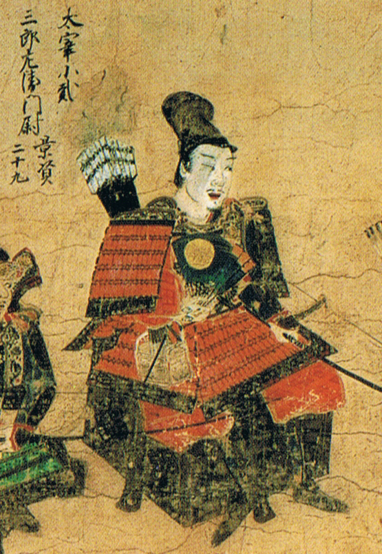 『蒙古襲来絵詞』絵二 前巻 箱﨑で竹崎季長の一行を見送る少弐景資